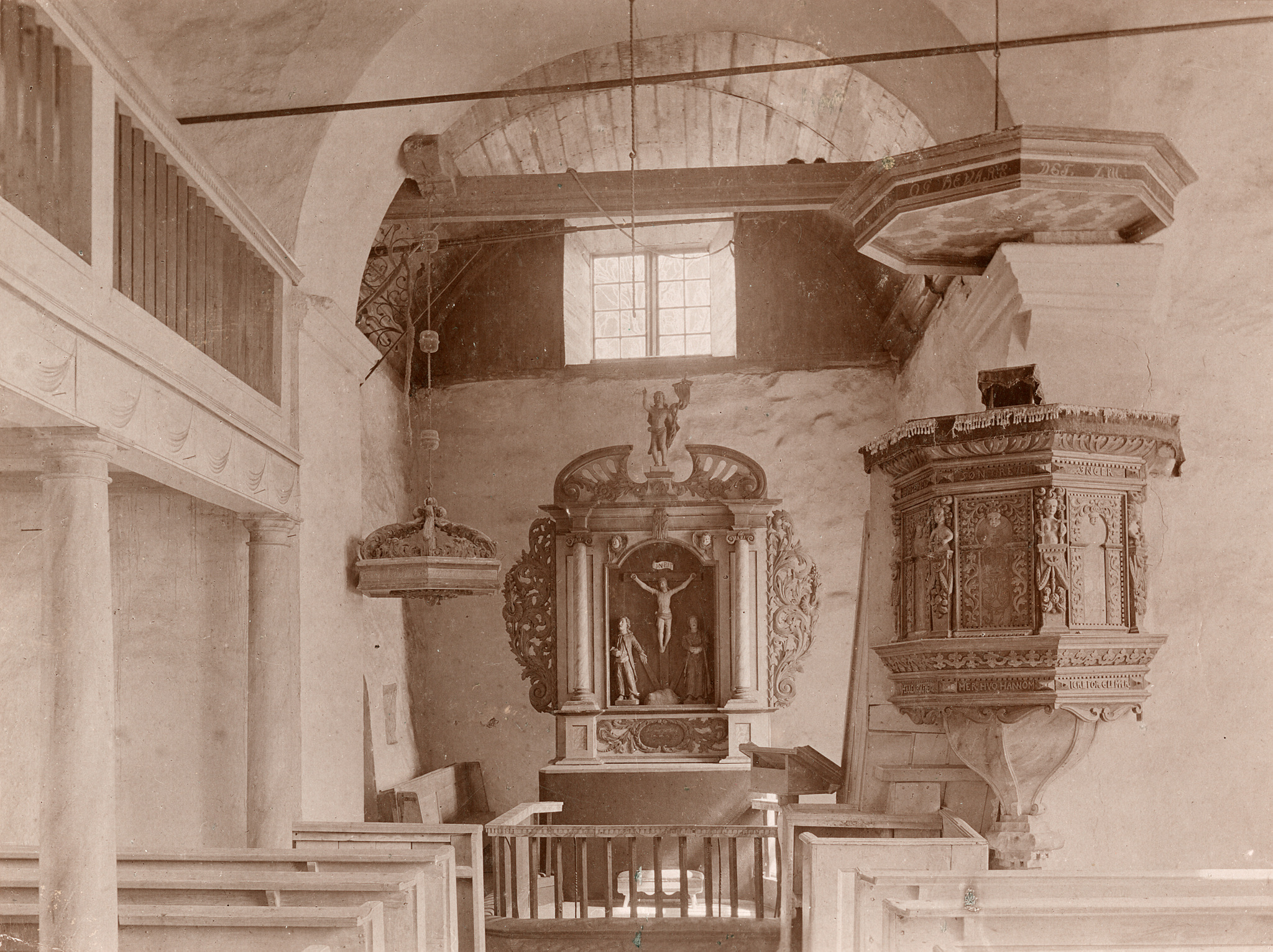 Interiør i Fiskum gamle kirke. Foto: Christian Christensen Thomhav, fra Kulturminnebilder.no.